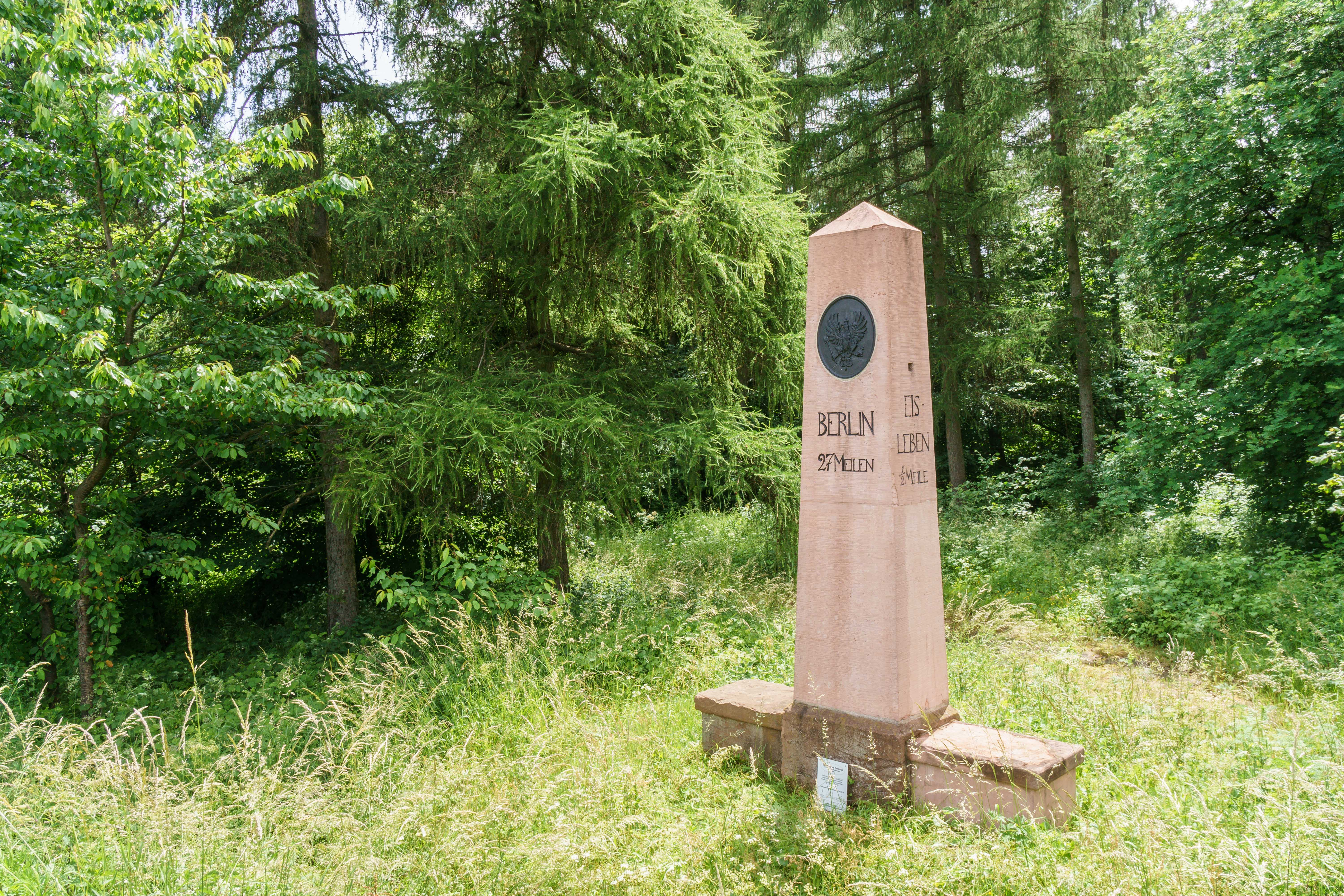 Preußischer Ganzmeilenobelisk mit Sitzbank an der L 151 zwischen Blankenheim und Wimmelburg. Inschrift: BERLIN 27 MEILEN ; EISLEBEN ½ MEILE ; SANGERHAUSEN 2 1/8 MEILE